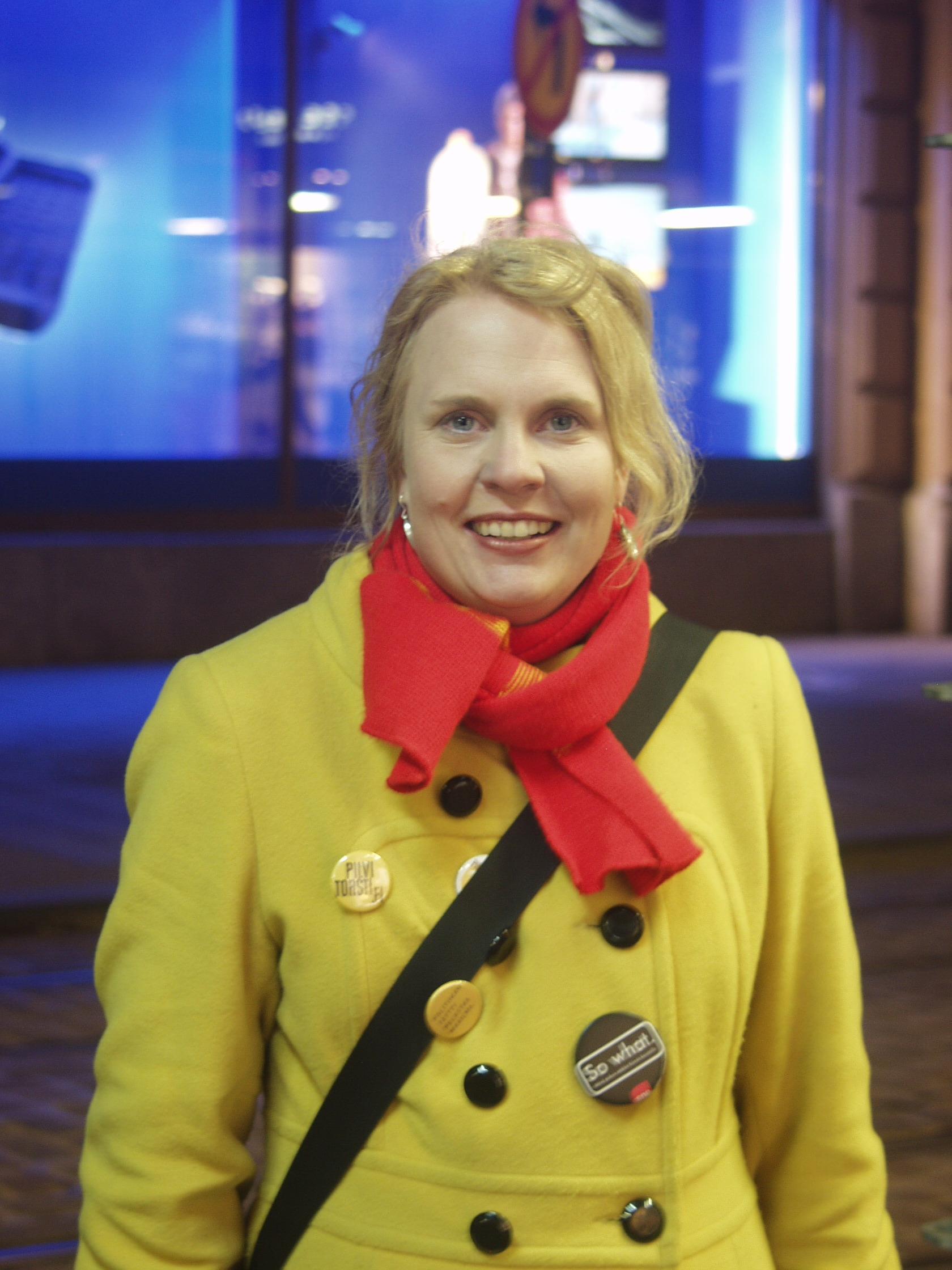 Pilvi Torsti Helsingin Aleksanterinkadulla huhtikuussa 2011